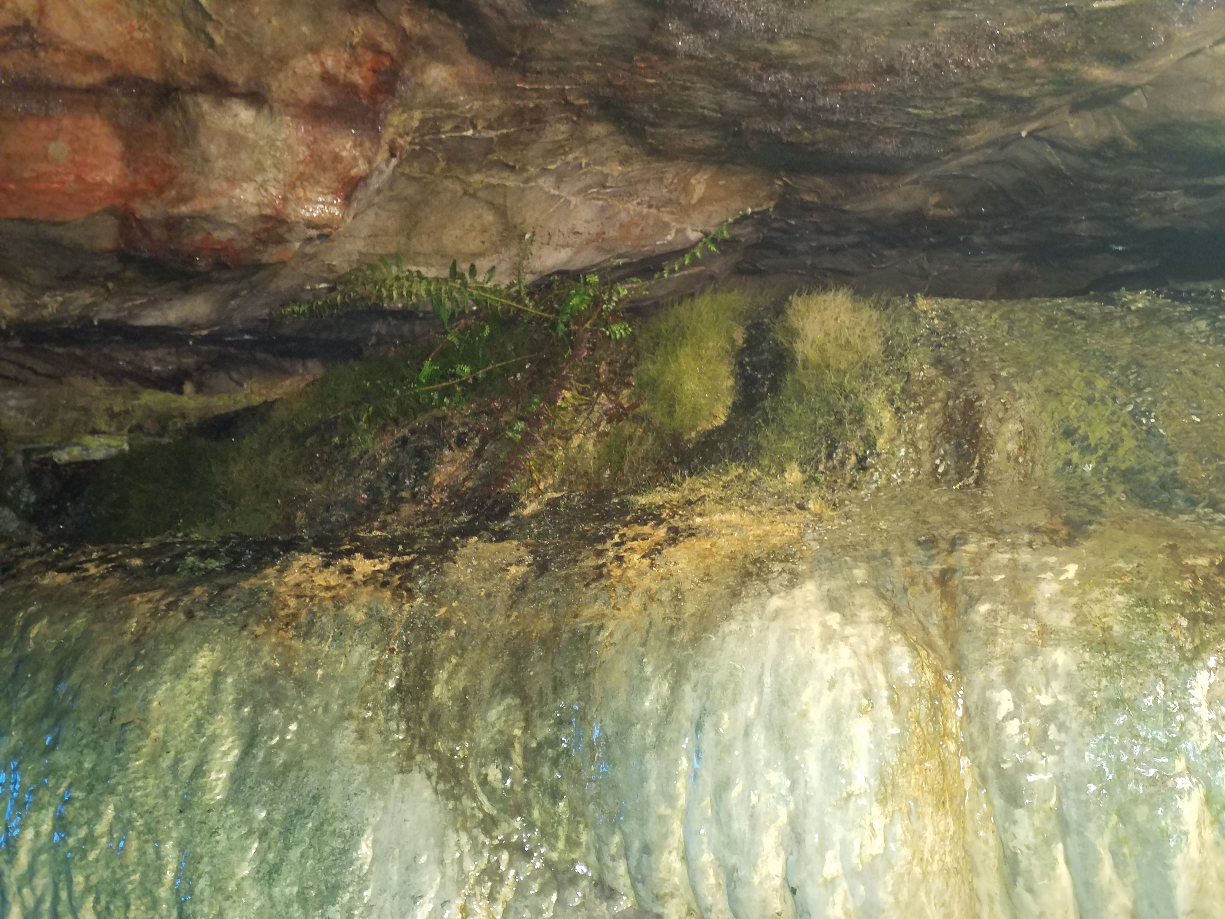 St. Beatus-Höhlen, Flora